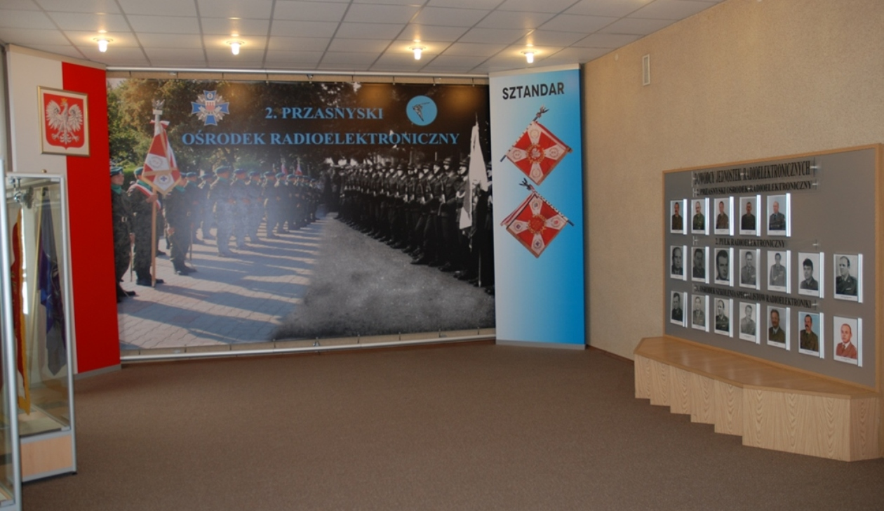 Sala tradycji 2 Orel